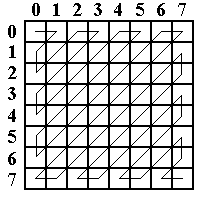 DCT transzformációnál használt eljárás